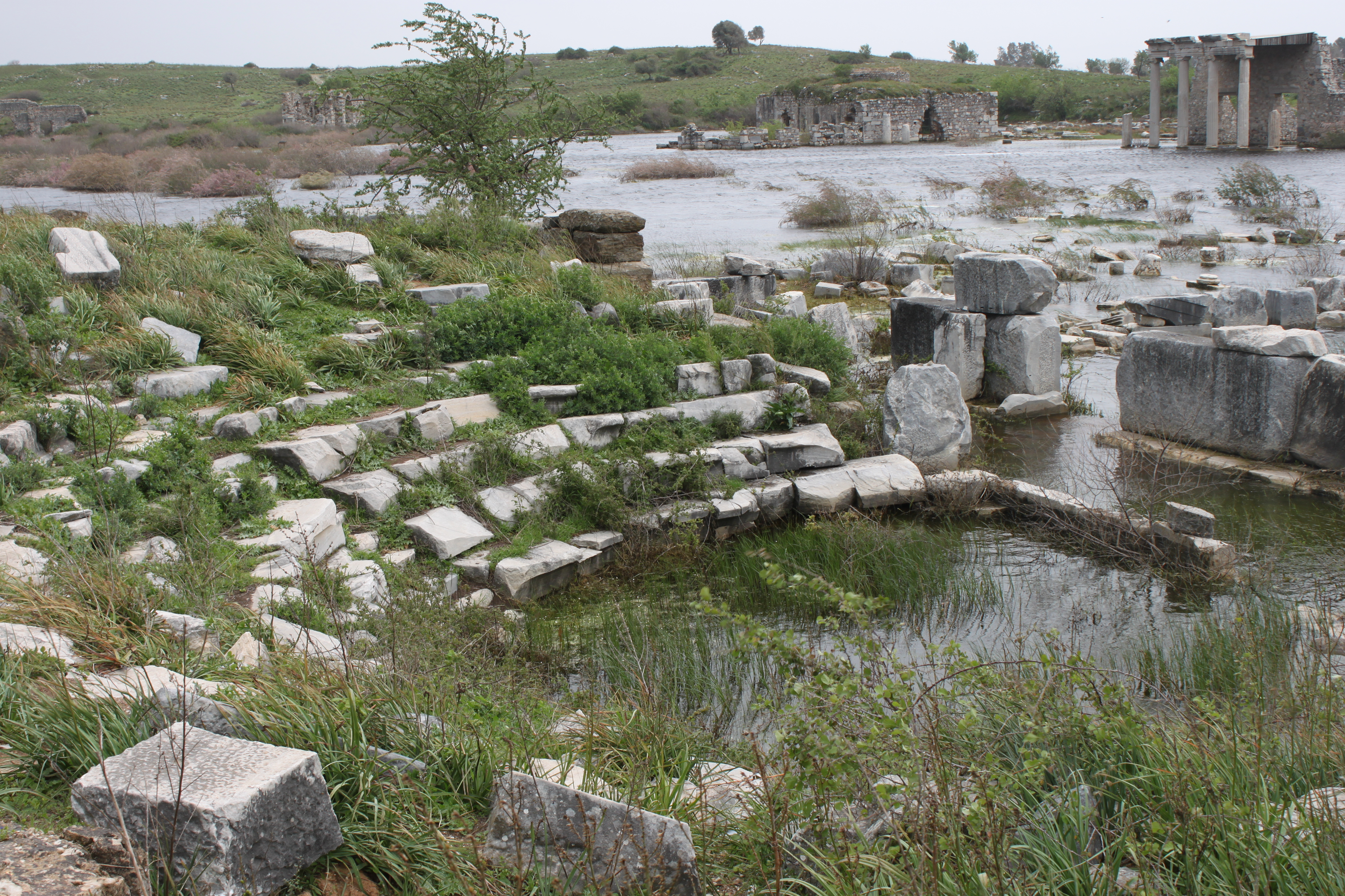 Bouleuterium (Ratssaal) in der antiken Stadt Milet in der Westtürkei